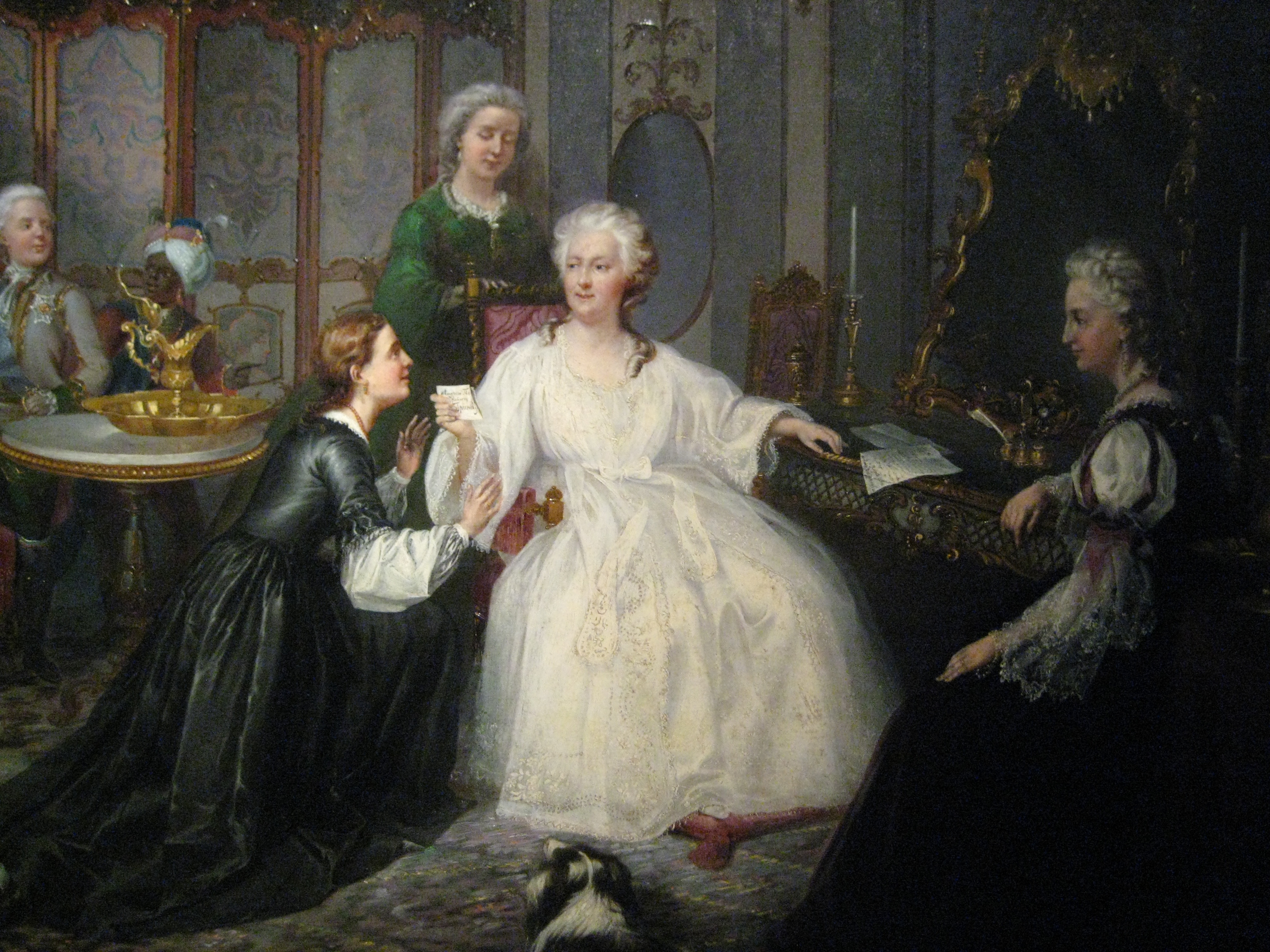 "Вручение письма Екатерине II", на сюжет повести "Капитанская дочка", 1861, ГТГ